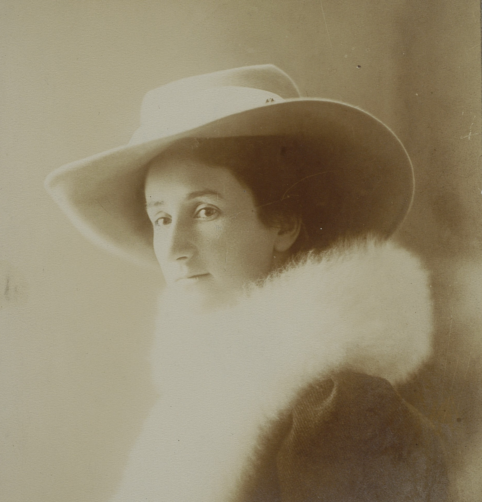 Maria Płonowska, 1911 r.